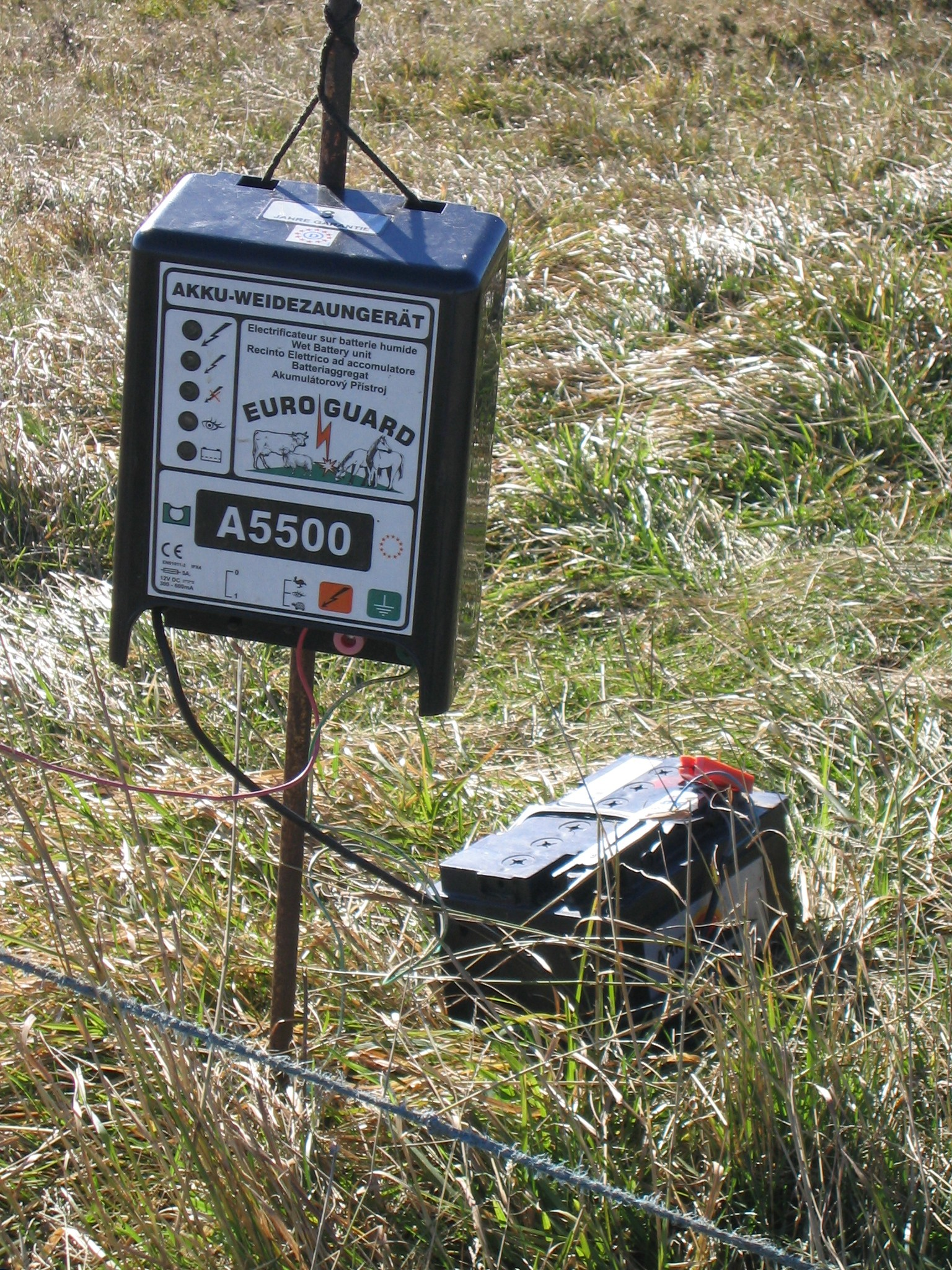 Akku-betriebenes Weidezaungerät